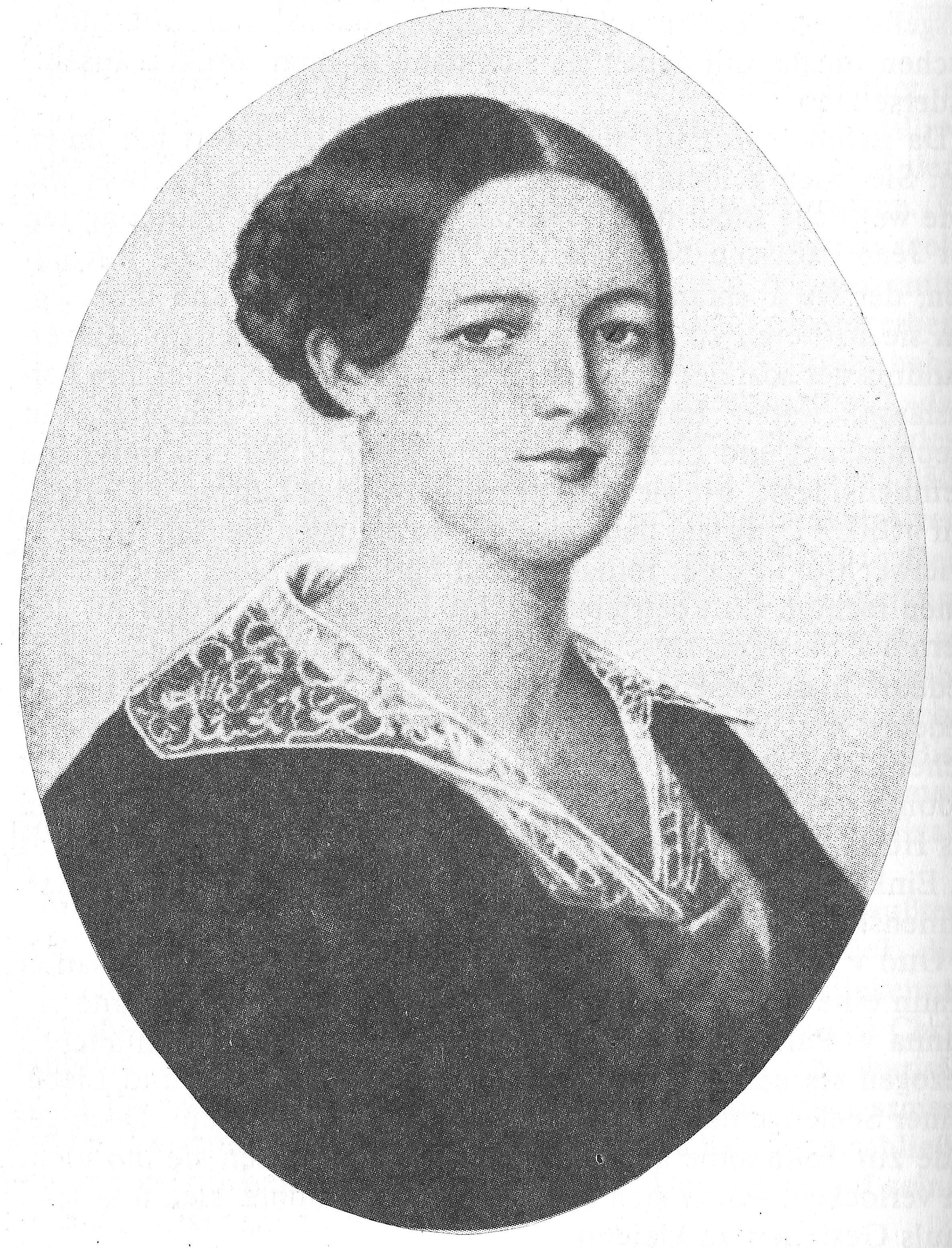 Bismarck von Adolf Menzel